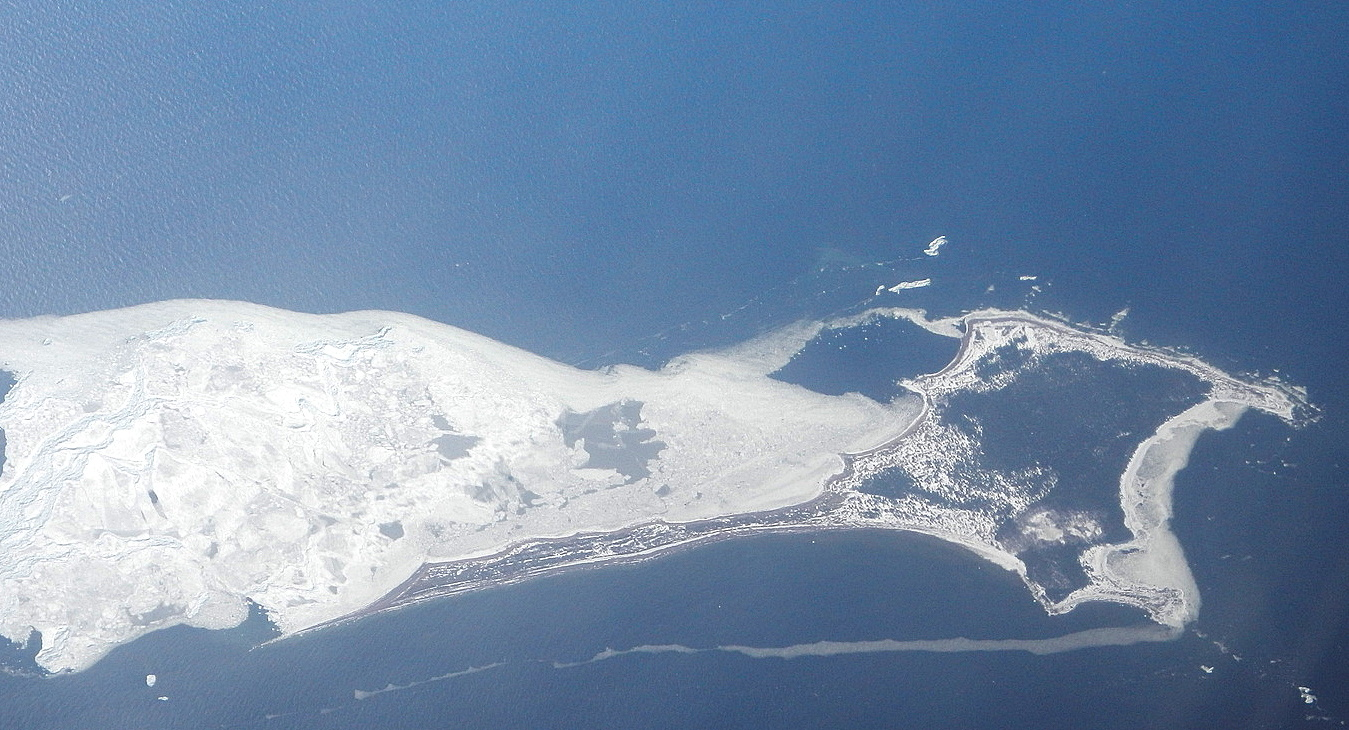 Säyvö eli Pien-Tytärsaari 20.3.2012